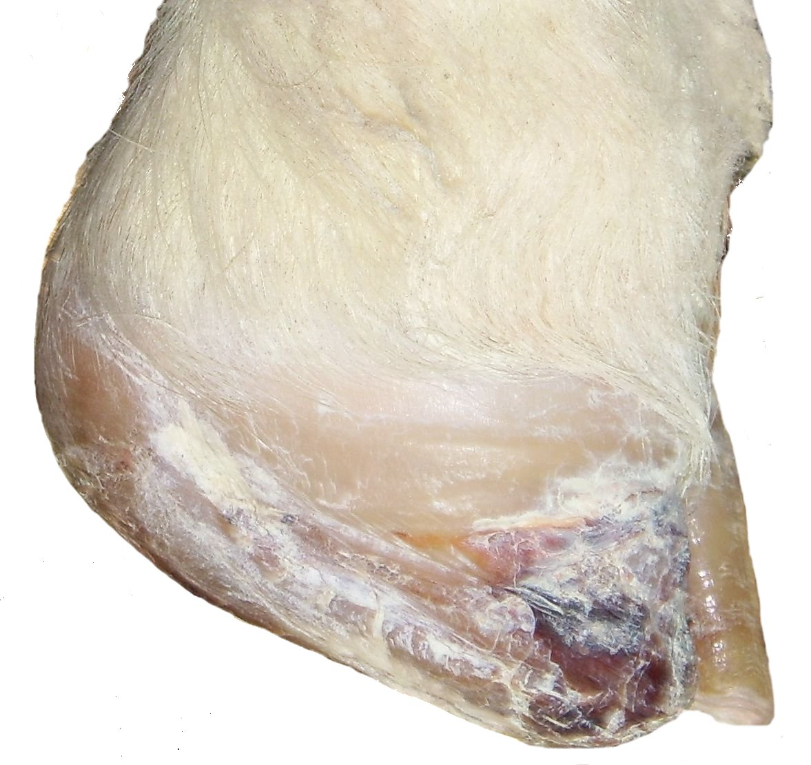 Nachwachsendes Horn nach Ausschuhen durch Klauenrehe bei einem Schaf nach 1 Monat regenrating horn 1 month after loss of the claw in a sheep due to Laminitis